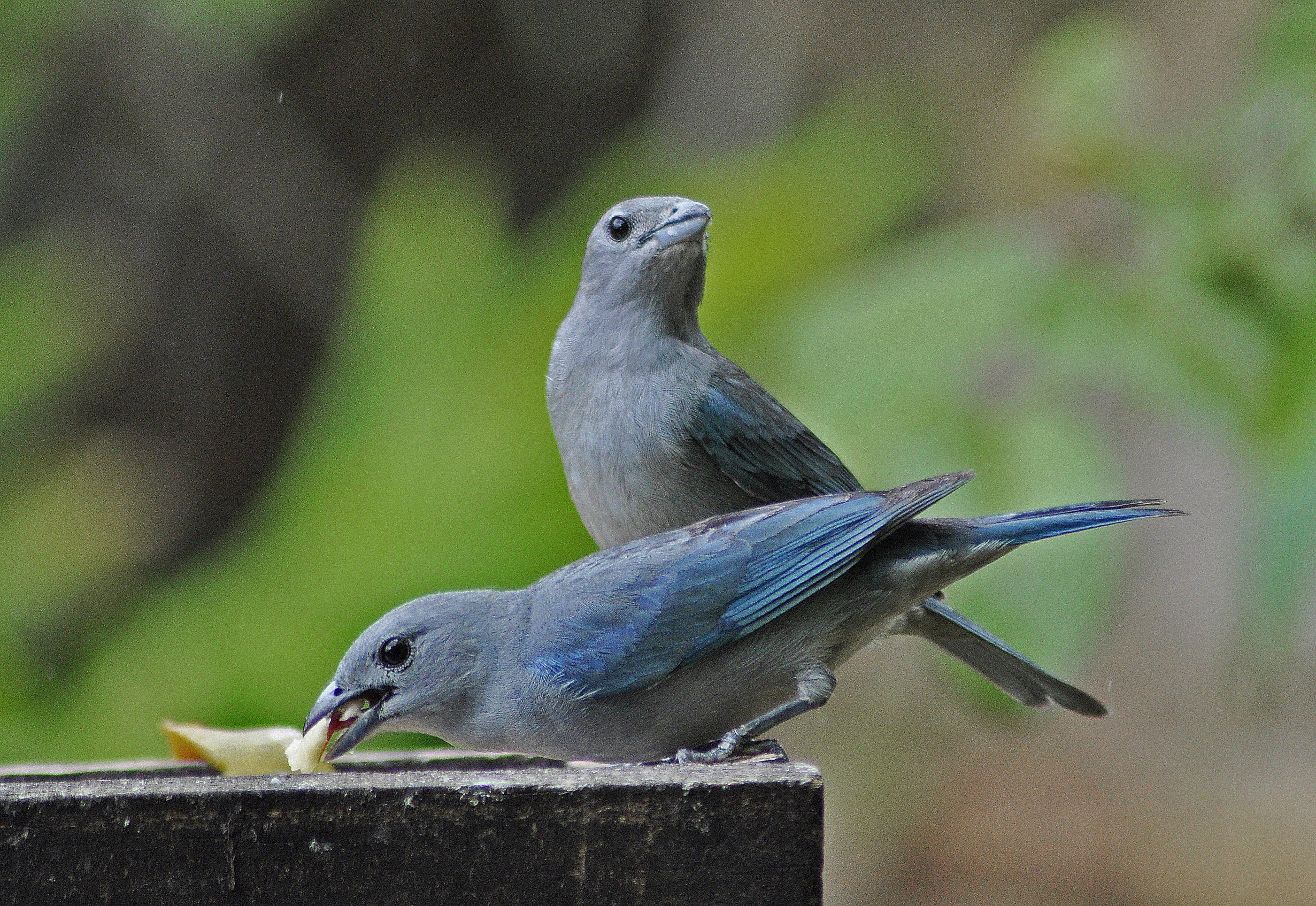 Casal alimentando-se.